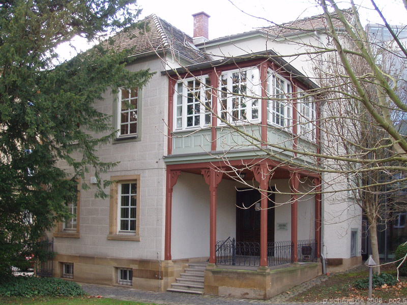 Eingangsbereich des Gebäudes Cäcilienstraße 47 in Heilbronn